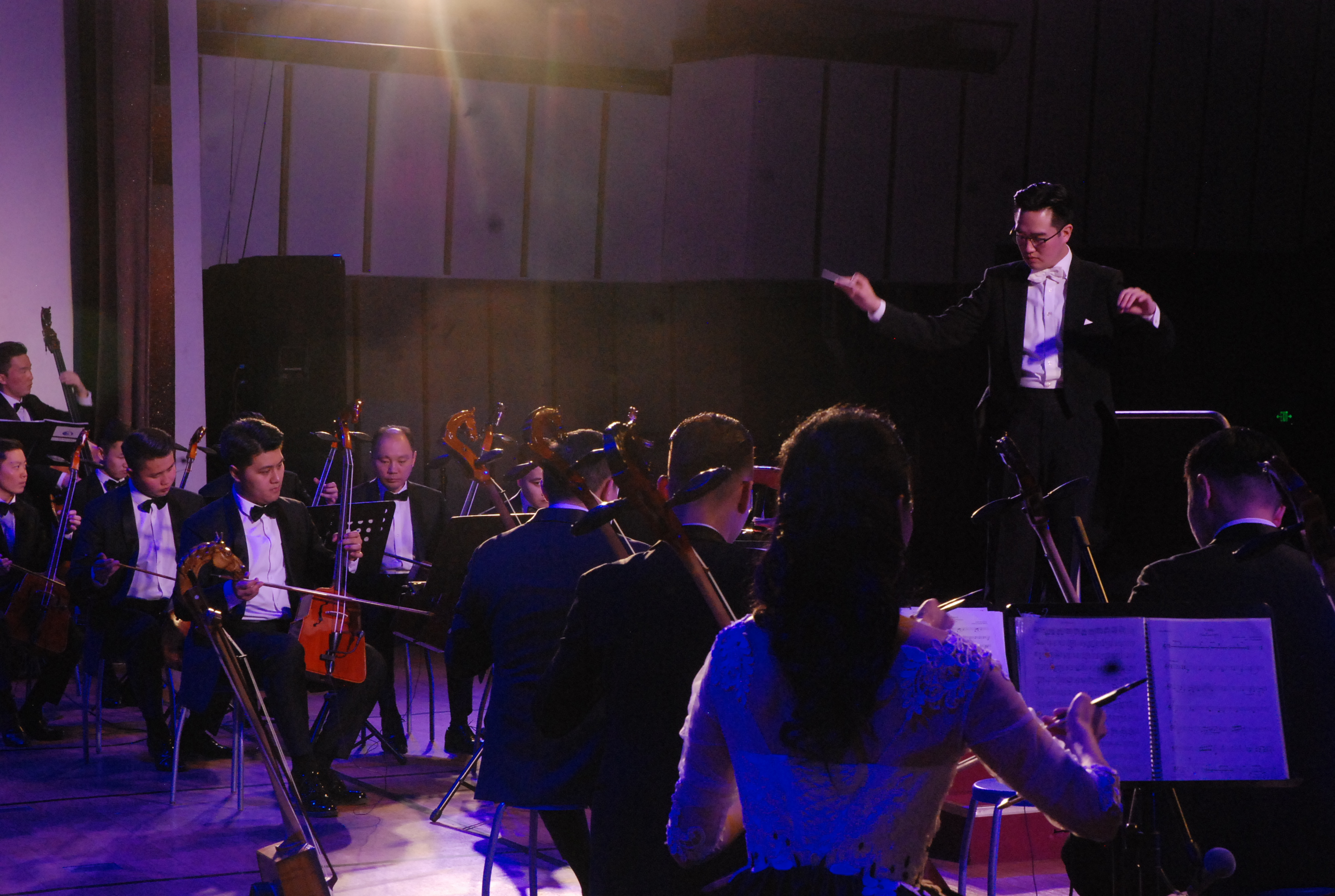 Монгол: Улсын Филармони